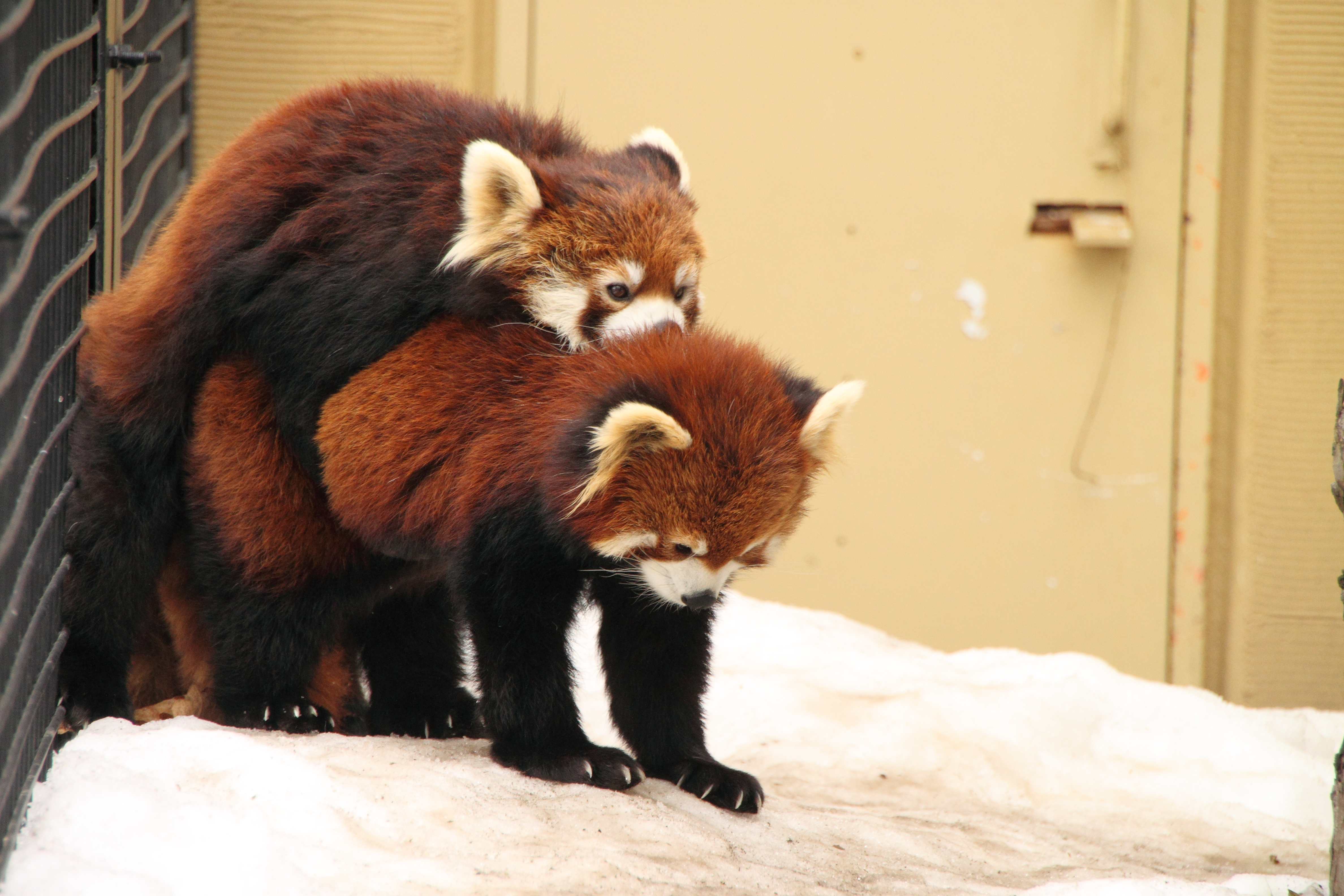 交尾の真っ最中。 切ないメスの顔つきが良い（爆）。 周囲からは微妙な空気が漂う。(；´Д｀) ASAHIYAMA Zoo. 旭山動物園（2011年3月）